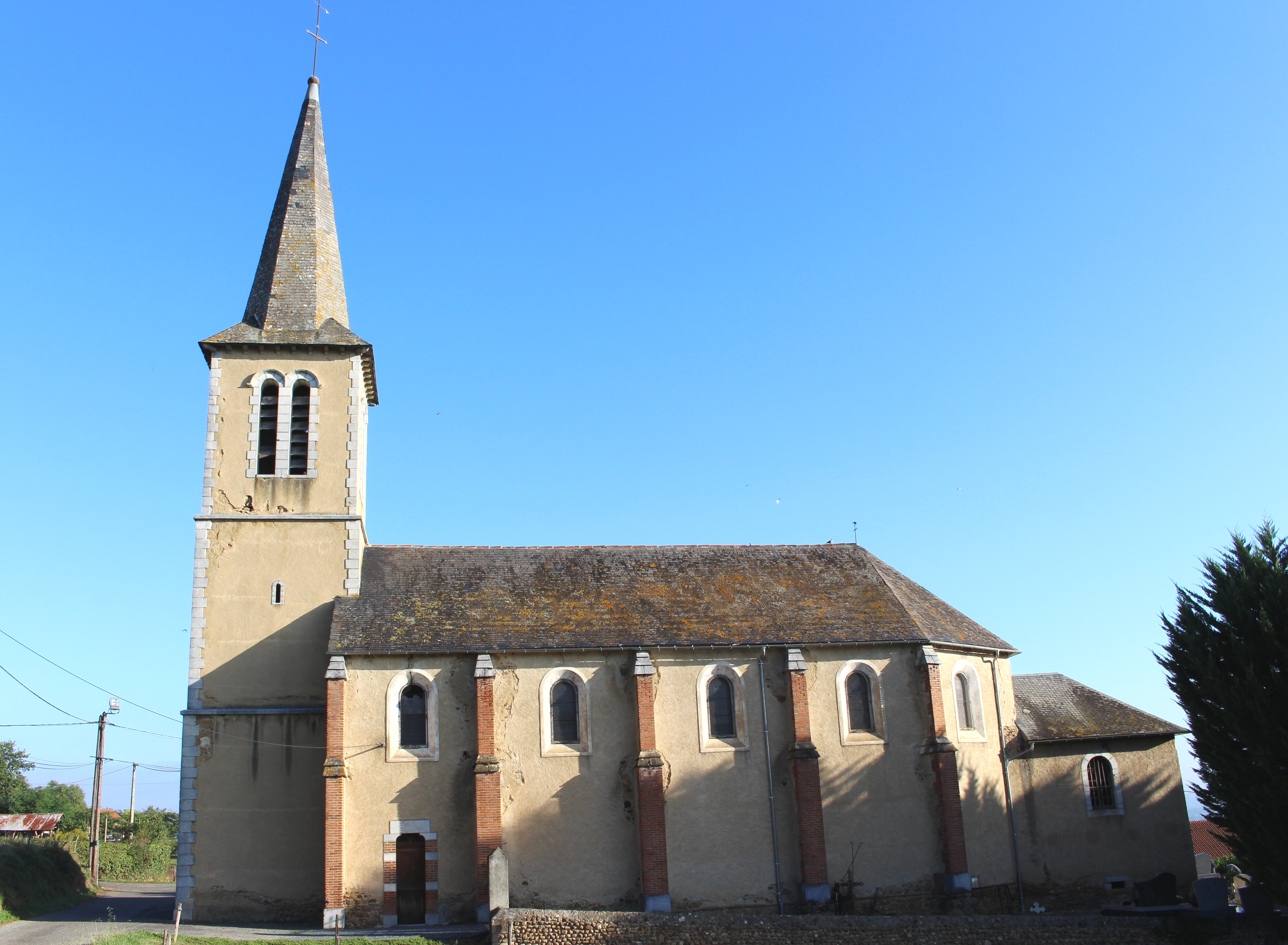 Église Saint-Martin de Sinzos (Hautes-Pyrénées)